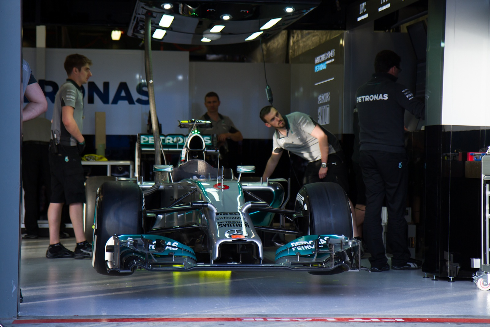 Mercedes F1 W05 i depån